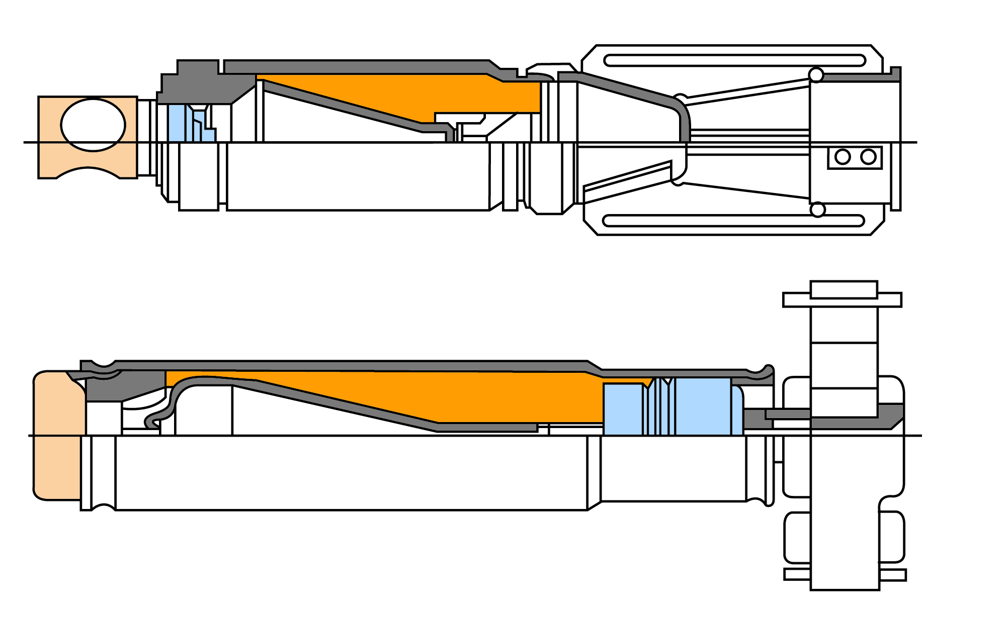 ПТАБ